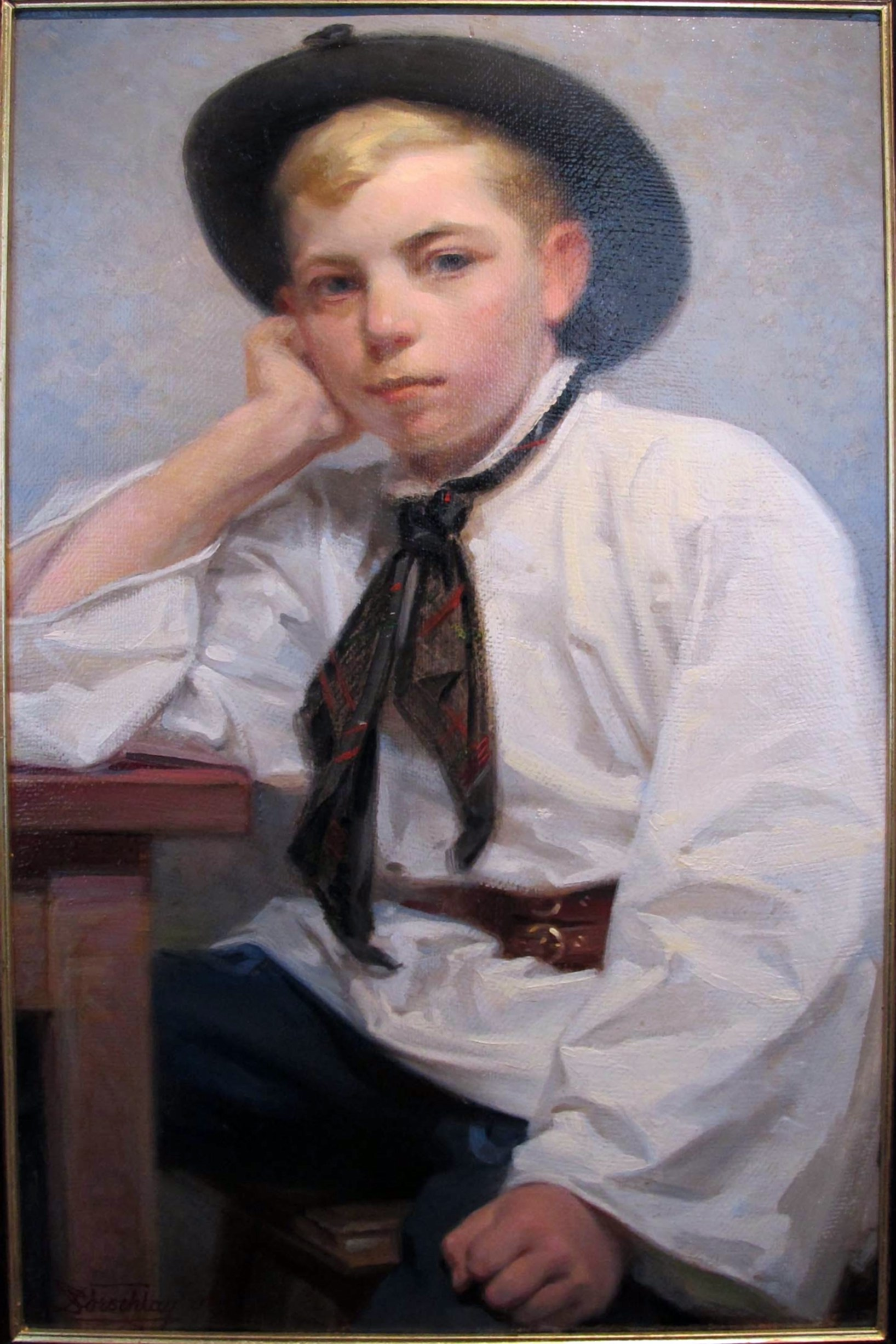 Carl dörschlag, figlio di un contadino sassone